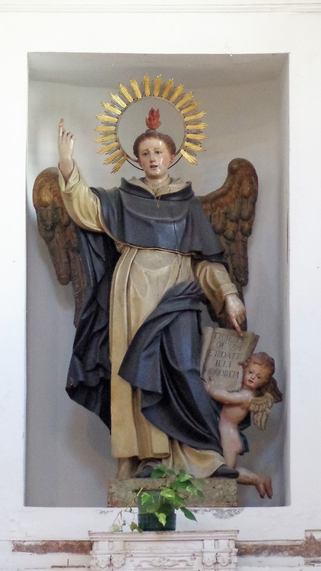 Statua San Vincenzo Ferrero, chiesa di Nostra Signora del Rosario.